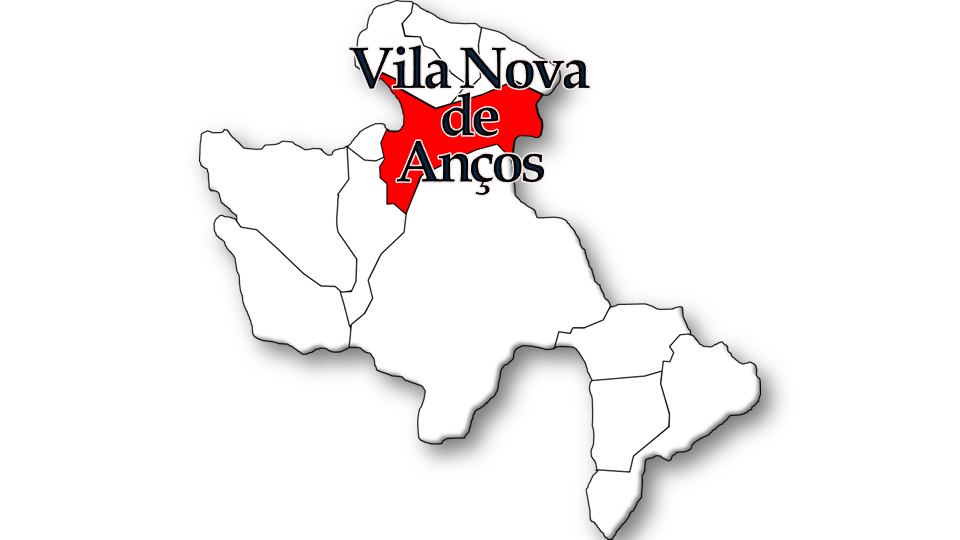 População